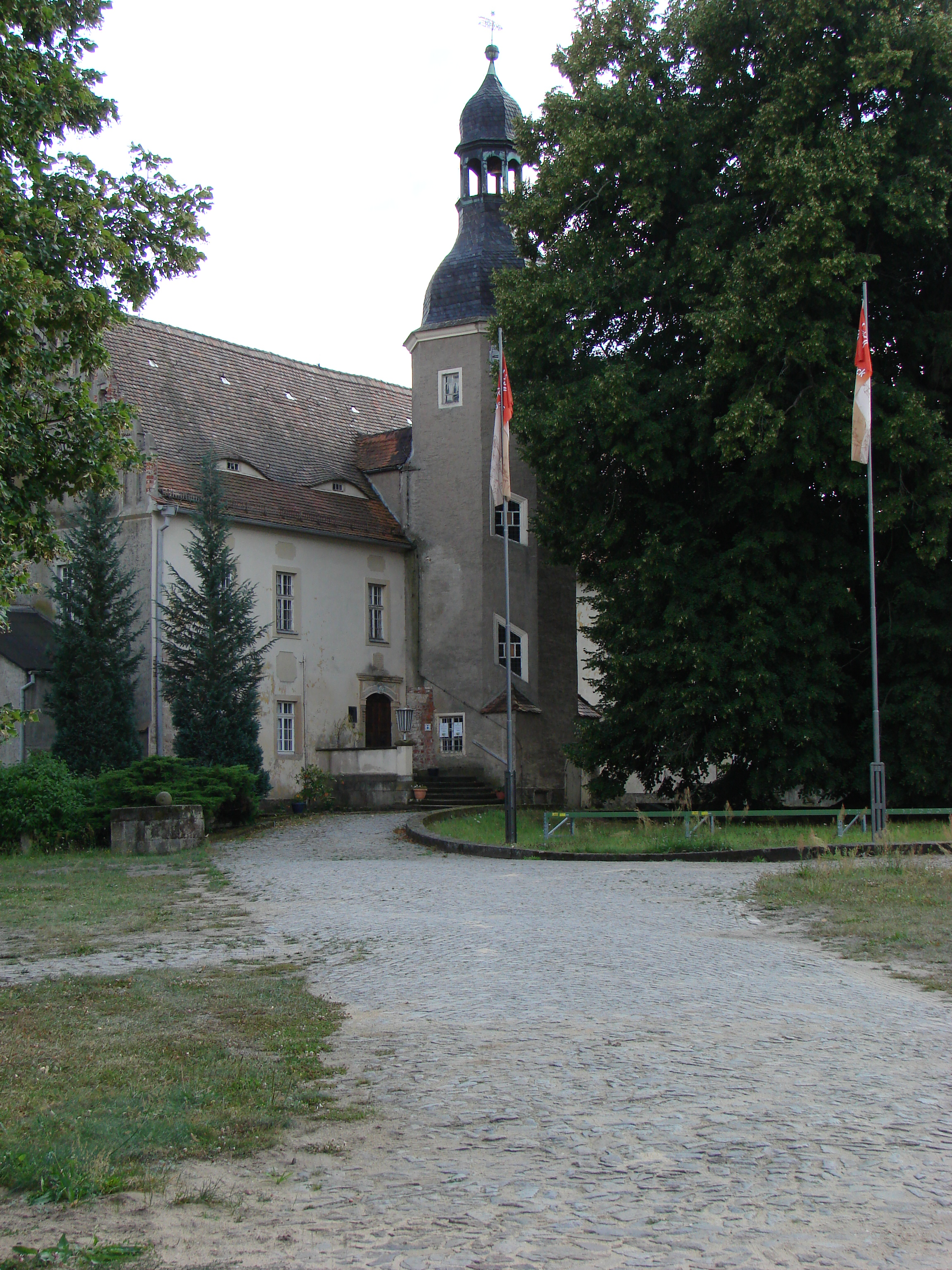 asymmetrisch polygonaler Treppenturm an der Hofseite, Schloss erbaut 1521